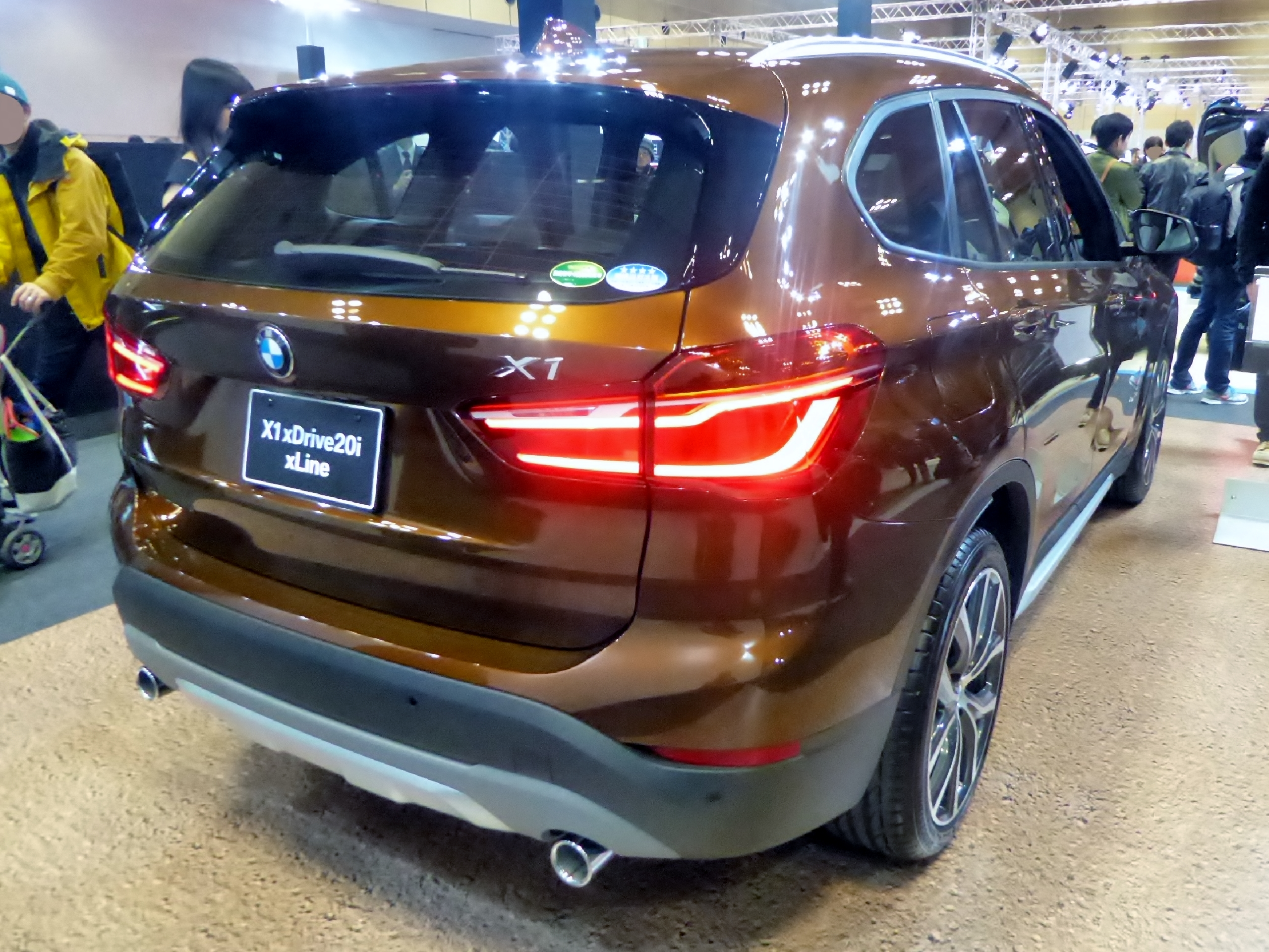 大阪モーターショー2015においてF48型BMW・X1 xDrive20i xLineを撮影。